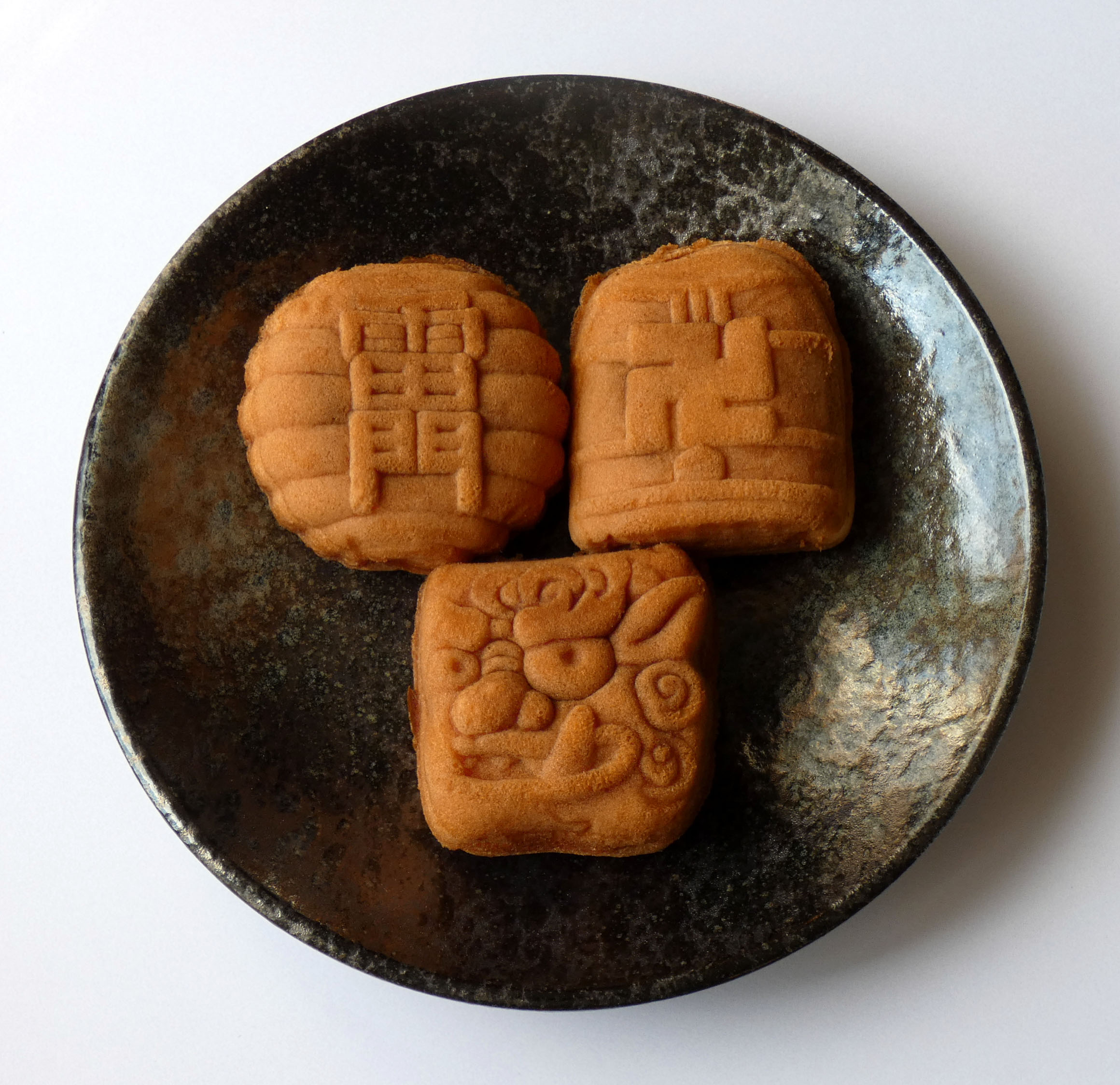 常盤堂雷おこし本舗 人形焼（1個 81円）